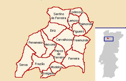 Mapa do concelho de Paços de Ferreira, por freguesias.